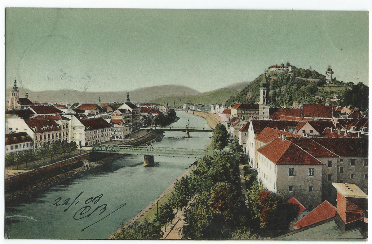 Vue de Graz, au début du XXe siècle.